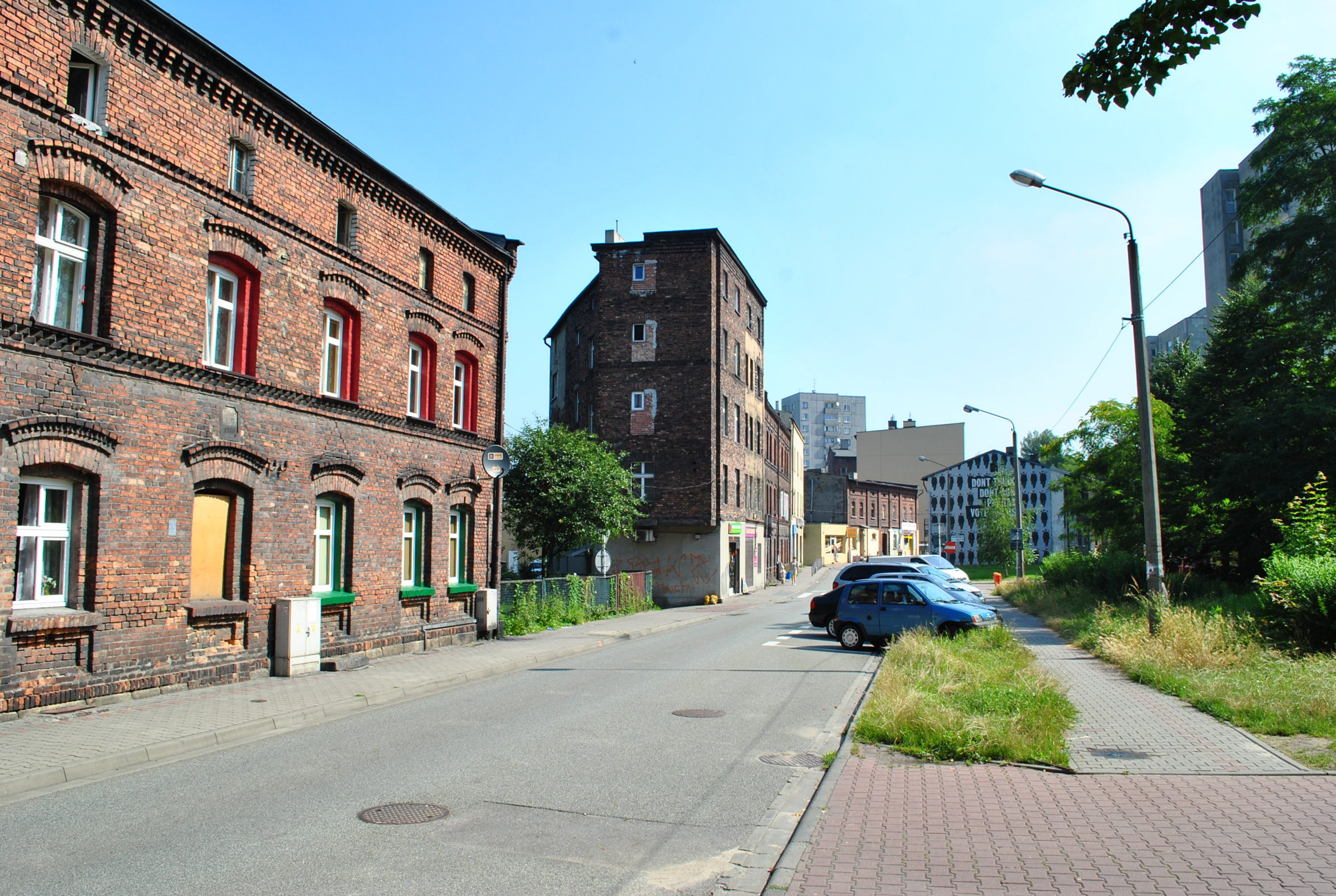 Katowice - Brynów. Ulica Wincentego Pola